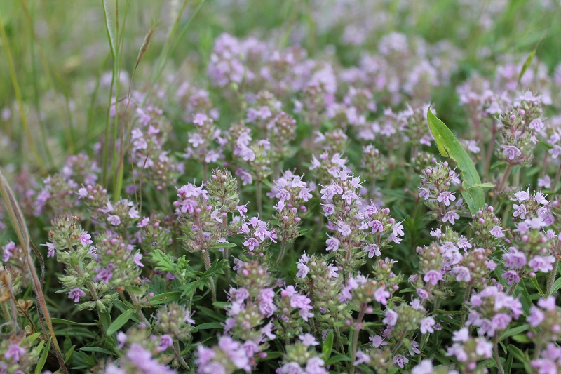 Чебрець Маршаллів. Україна, Дніпропетровська область, Криворізький район.